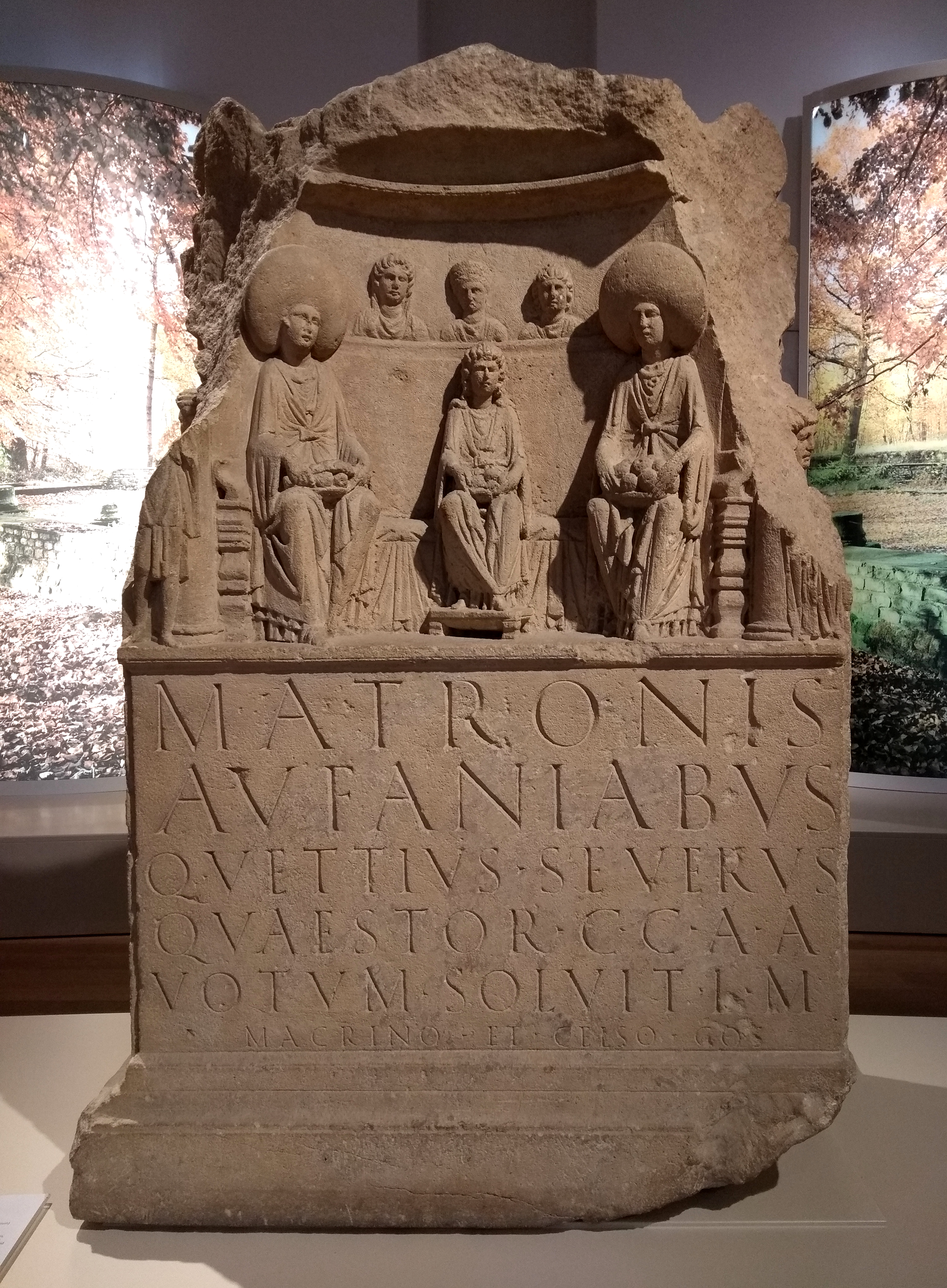 Matronenaltar im Rheinischen Landesmuseum Bonn (AE 1930,19), Vorderansicht